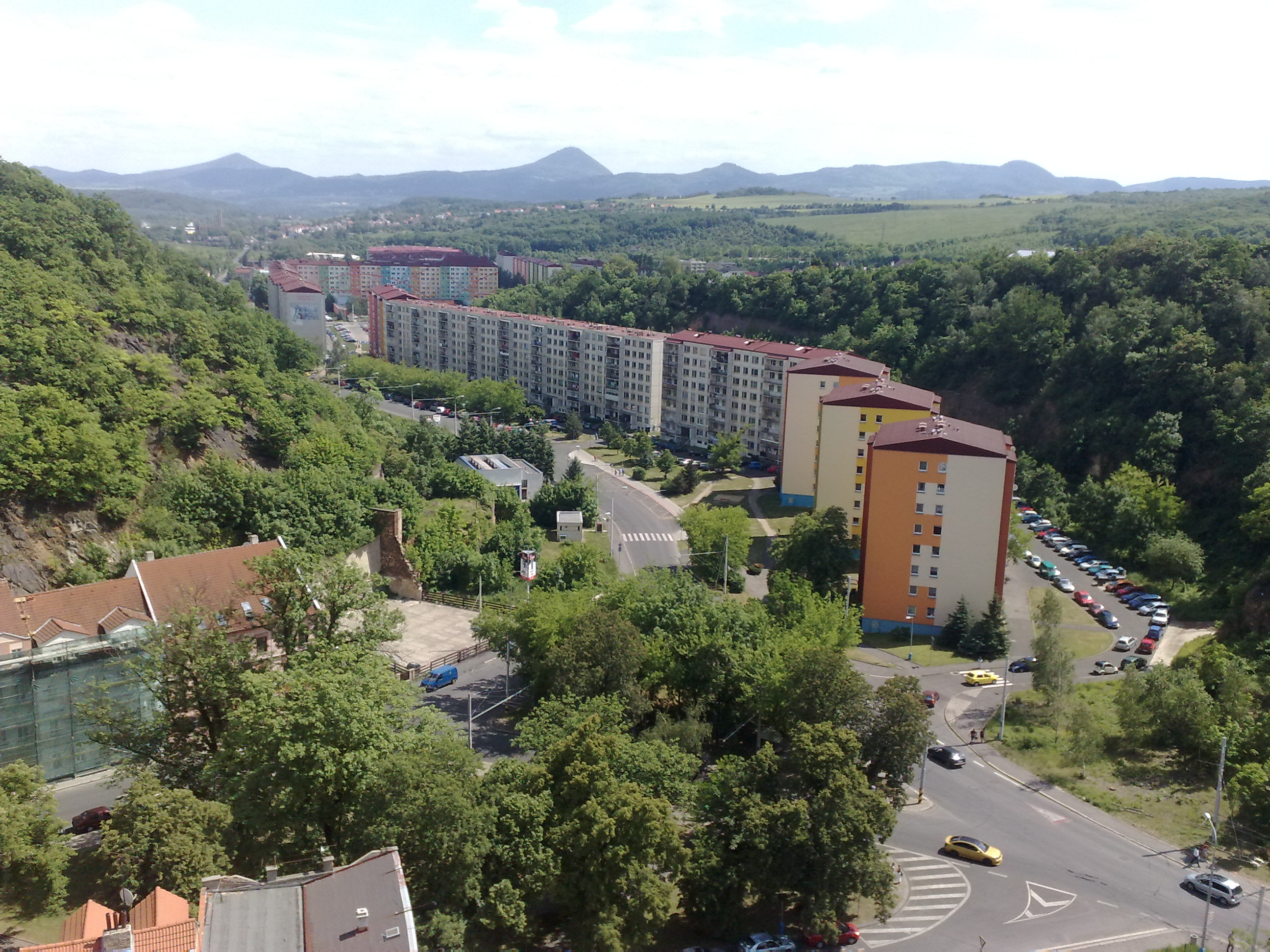 Během lázeňské sezóny byla vyhlídková věž obchodní akademie v Teplicích otevřena pro veřejnost za malé vstupné.